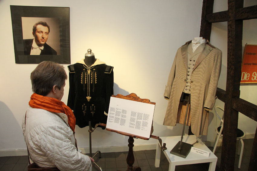 Fritz-Wunderlich-Ausstellung im Kuseler Heimatmuseum (2010)